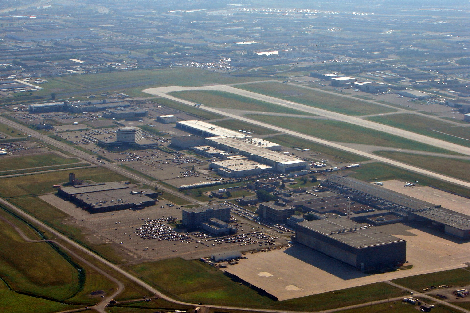 Montréal-Pierre Elliott Trudeau International Airport, Quebec, Canada